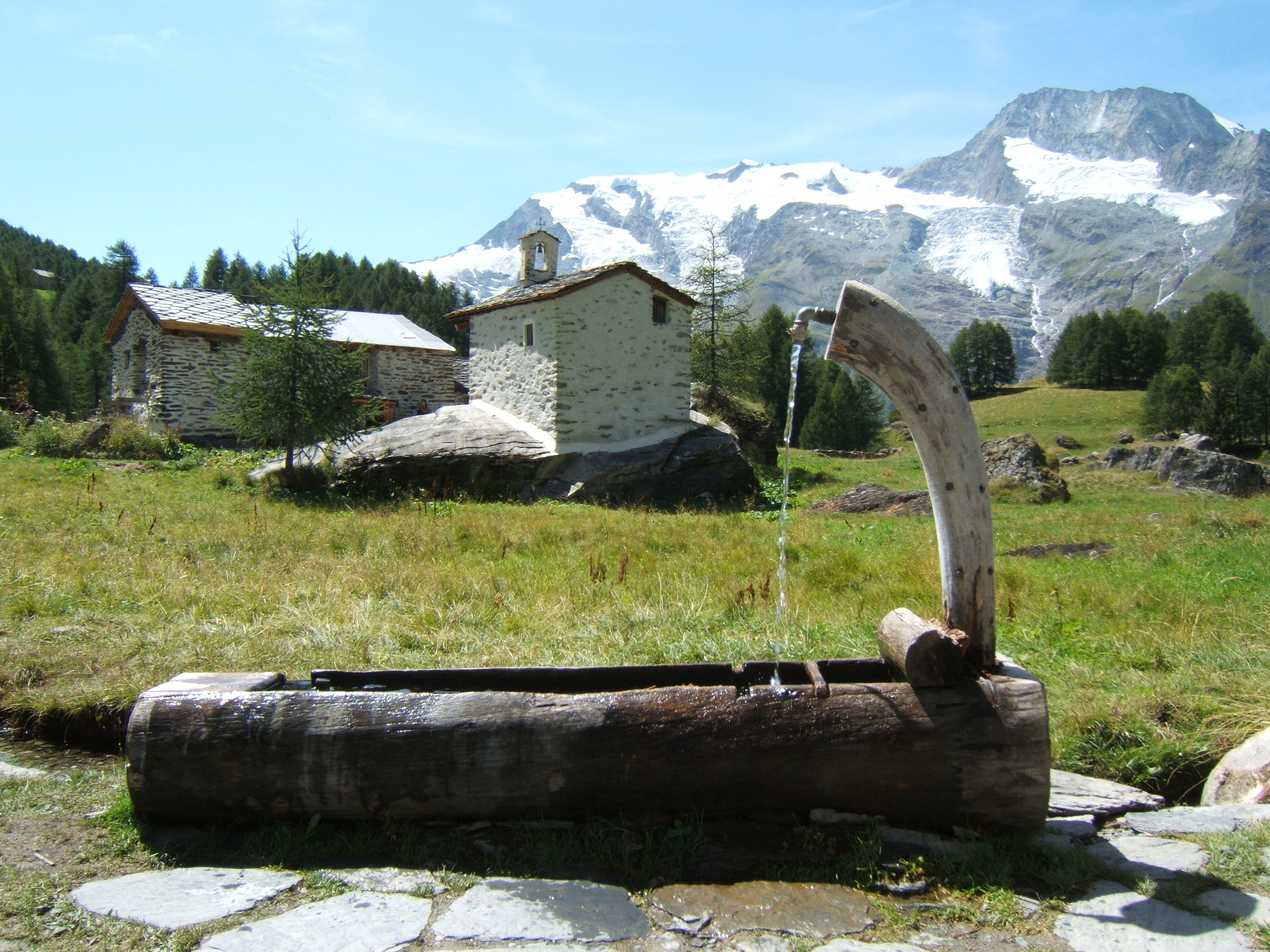 La fontaine et la chapelle Saint-Clair au hameau du Monal à Sainte-Foy-Tarentaise en Haute-Tarentaise, dans le parc de la Vanoise, en Savoie. En arrière plan, se dresse les faces est du Mont Turia sur la droite du massif et du Mont Pourri au centre (avec la Brèche Puiseux à son pied, côté sud), ainsi que le Dôme de la Sache sur la gauche.